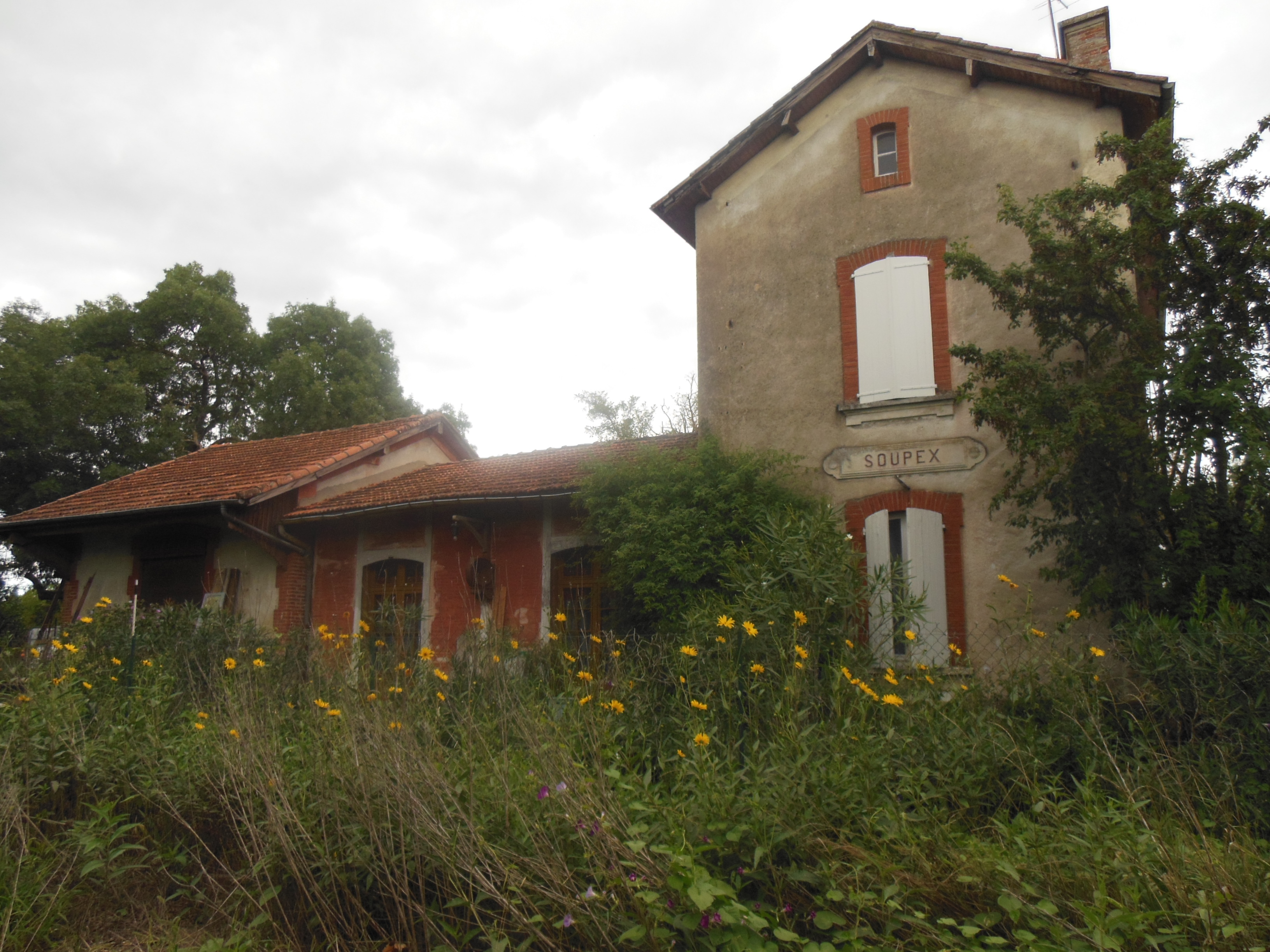 Ancien bâtiment de la gare de Soupex, Aude, France, devenu une habitation privée.